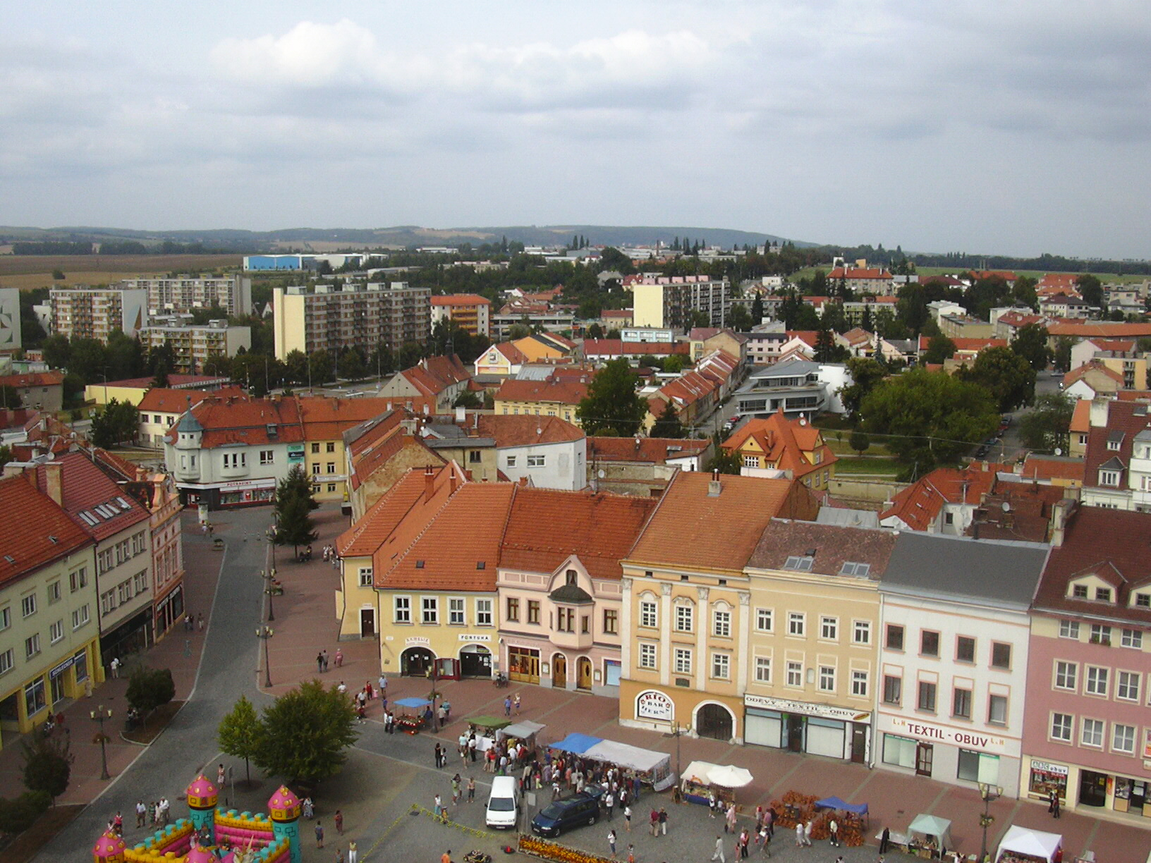 Předměstí Vyškova pohled z radnice (Vyškov- czech republic)